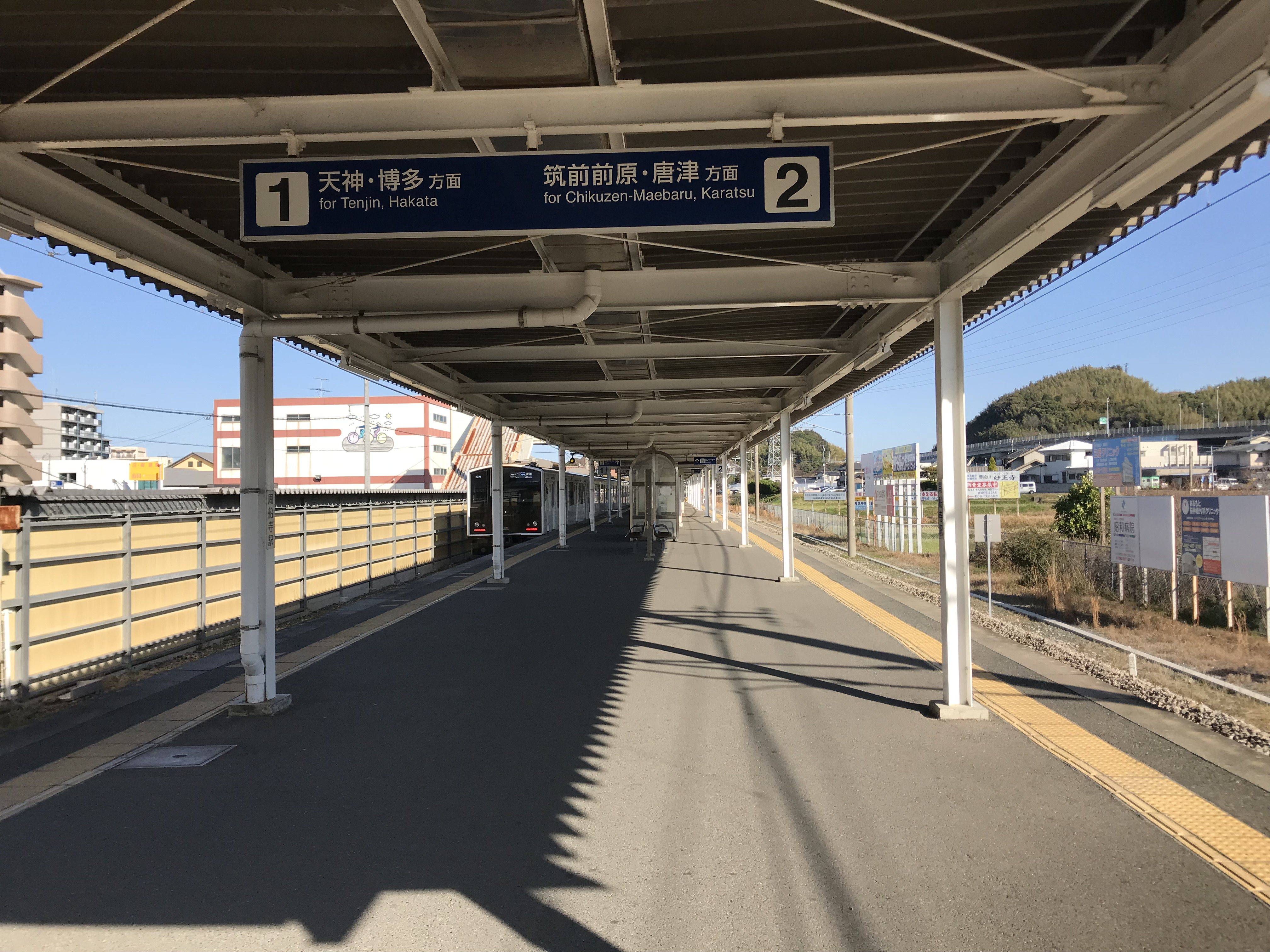 周船寺駅のホーム(奥は九大学研都市方面)